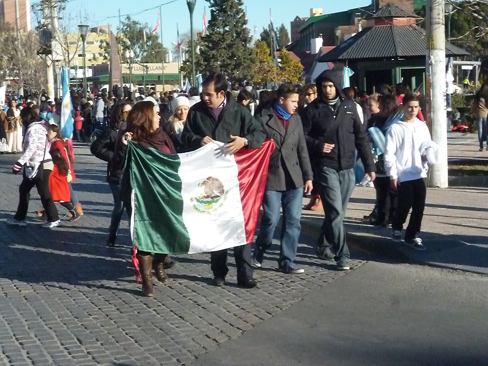 Grupo de mexicanos en Trelew, Argentina